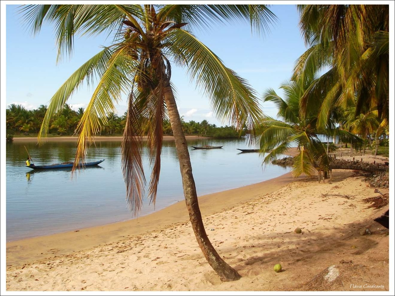 Campinho, Maraú, Bahia